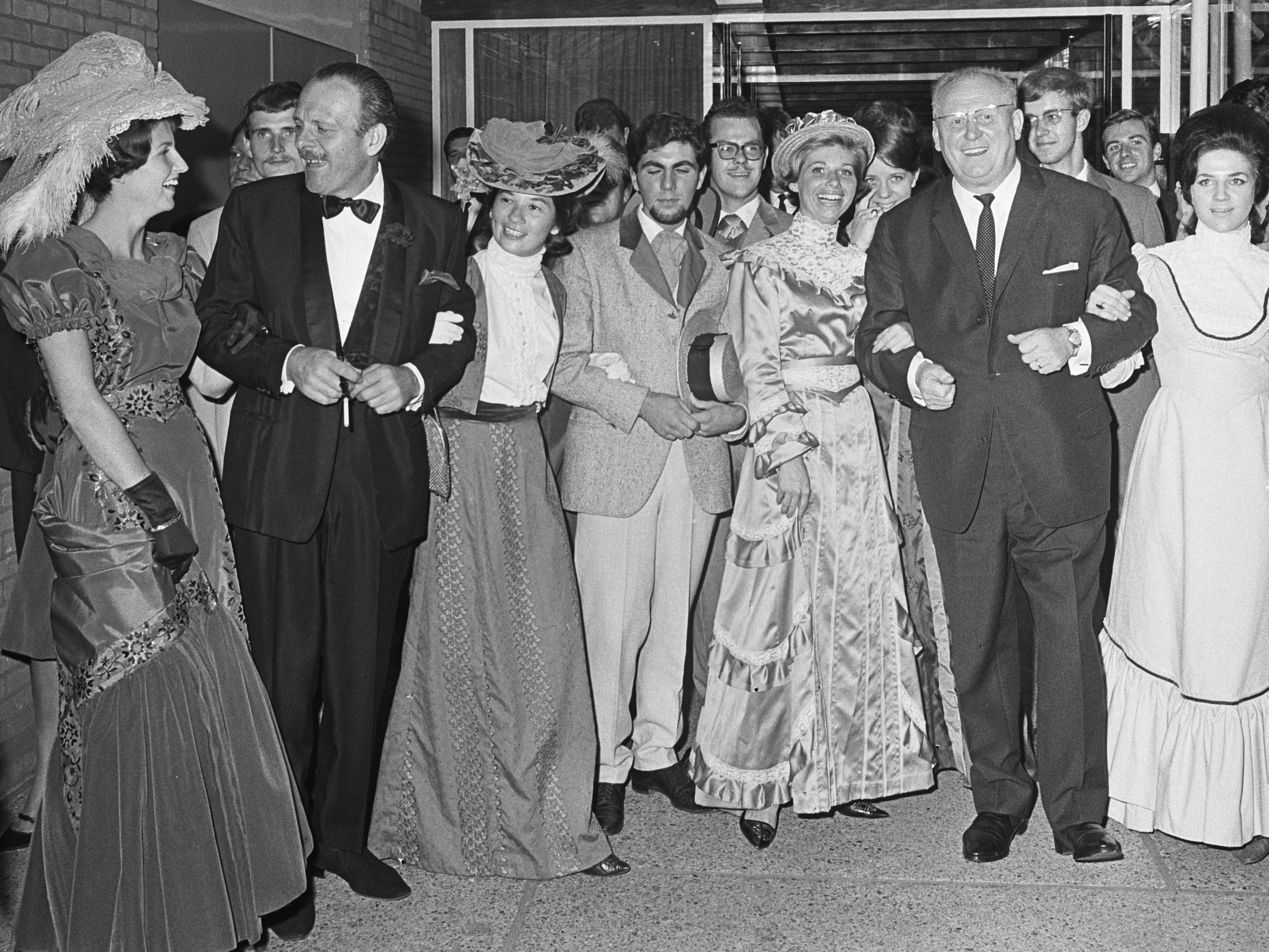 Premiere van de film "Knotsgekke kerels in hun vliegende kratten" (Engelse titel "Those Magnificent Men in Their Flying Machines") in bioscoop Du Midi; Gert Fröbe en Terry Thomas aanwezig bij de premiere. 15 juli 1965